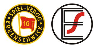 Wappen 16-54